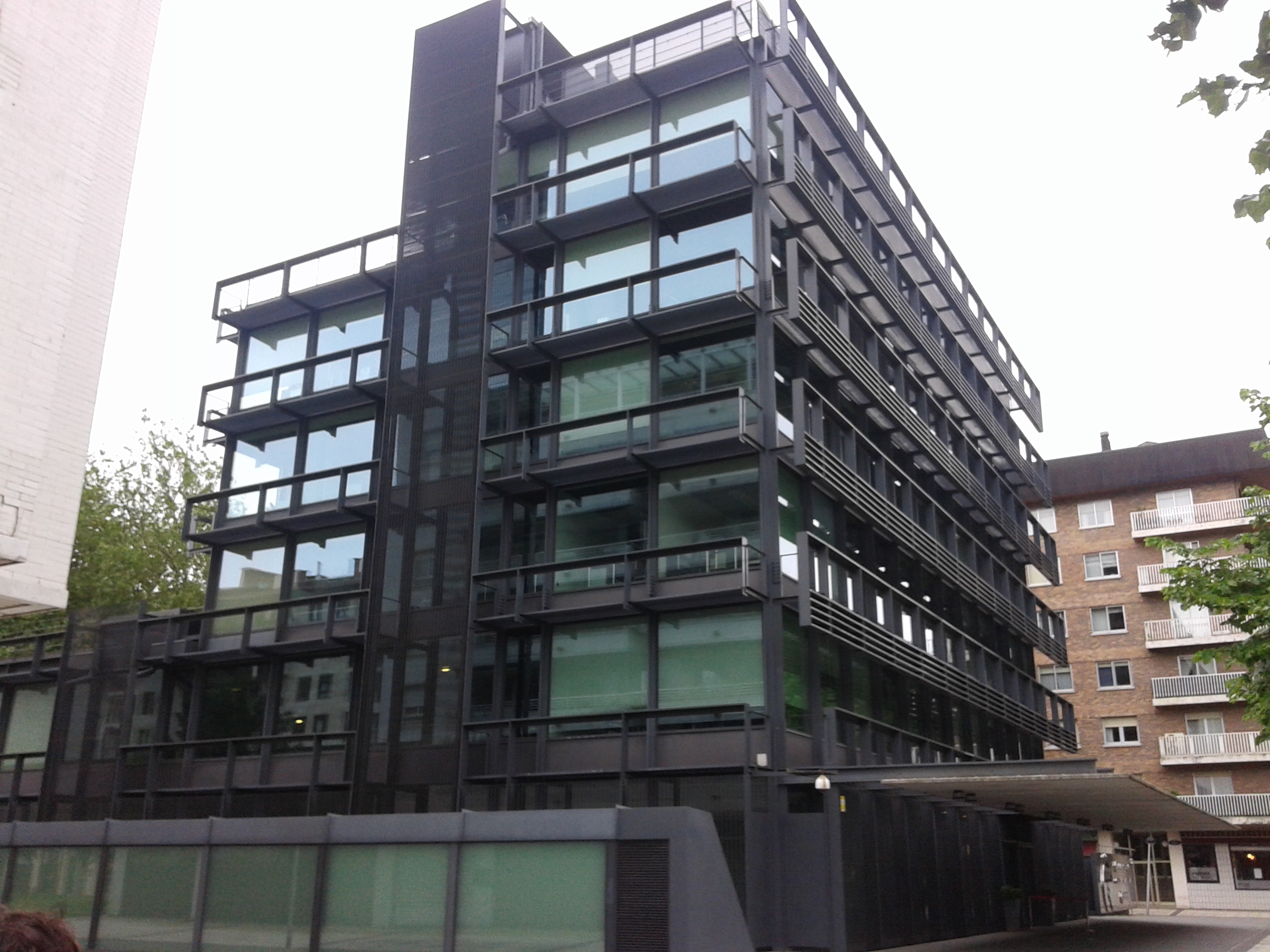 Gipuzkoako Merkataritza Ganberarena (Gipuzkoako Bazkundea) Donostian